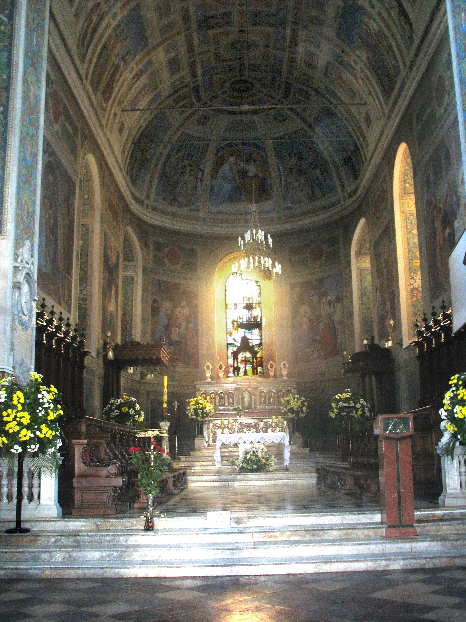 Prezbiterium - katedra płocka